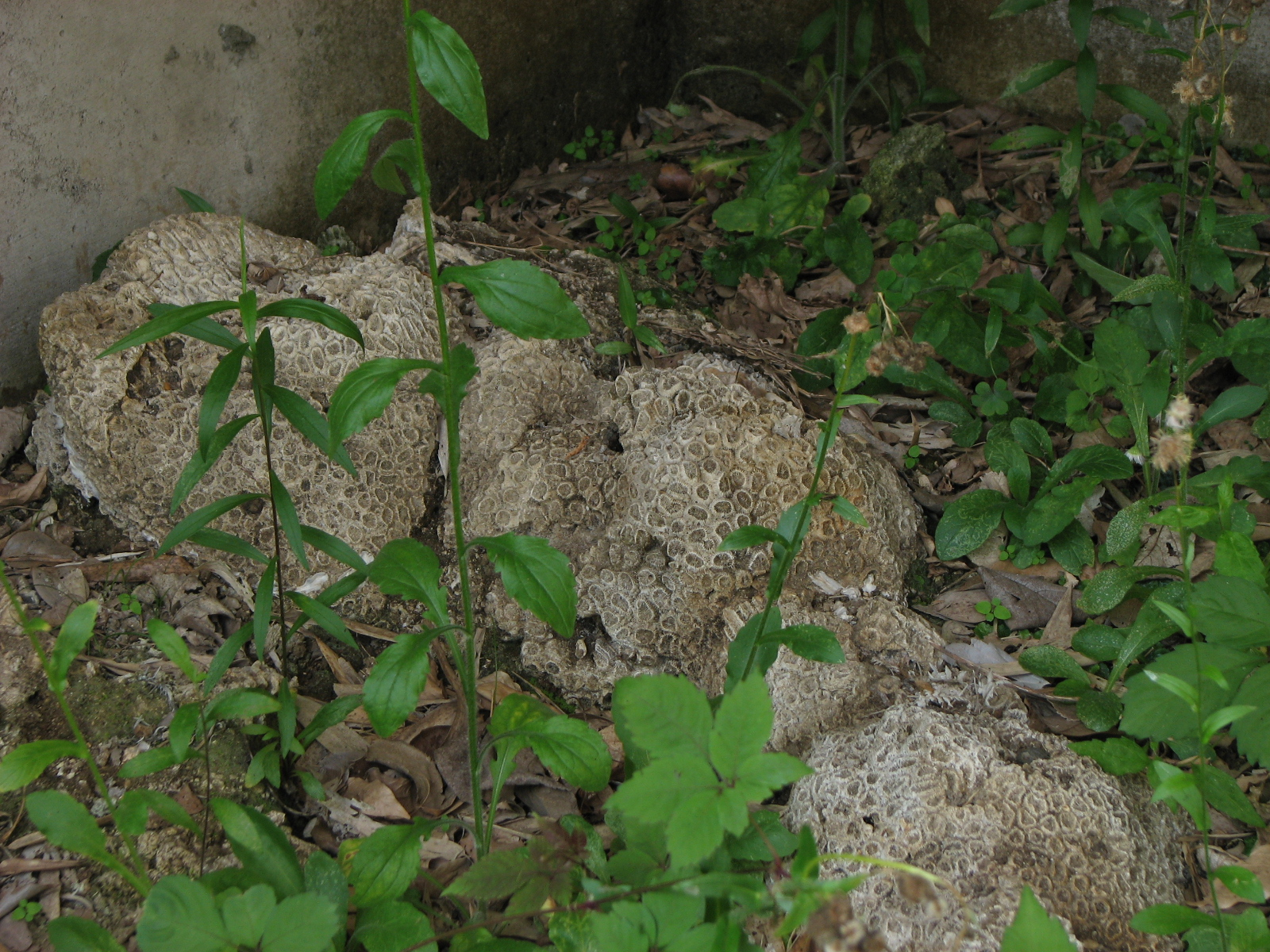 沼サンゴ(Numa Coral Reef) 千葉県館山市沼にて撮影